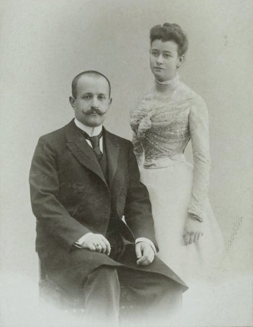 Граф Александр Васильевич Гудович с женой Марией Сергеевной.